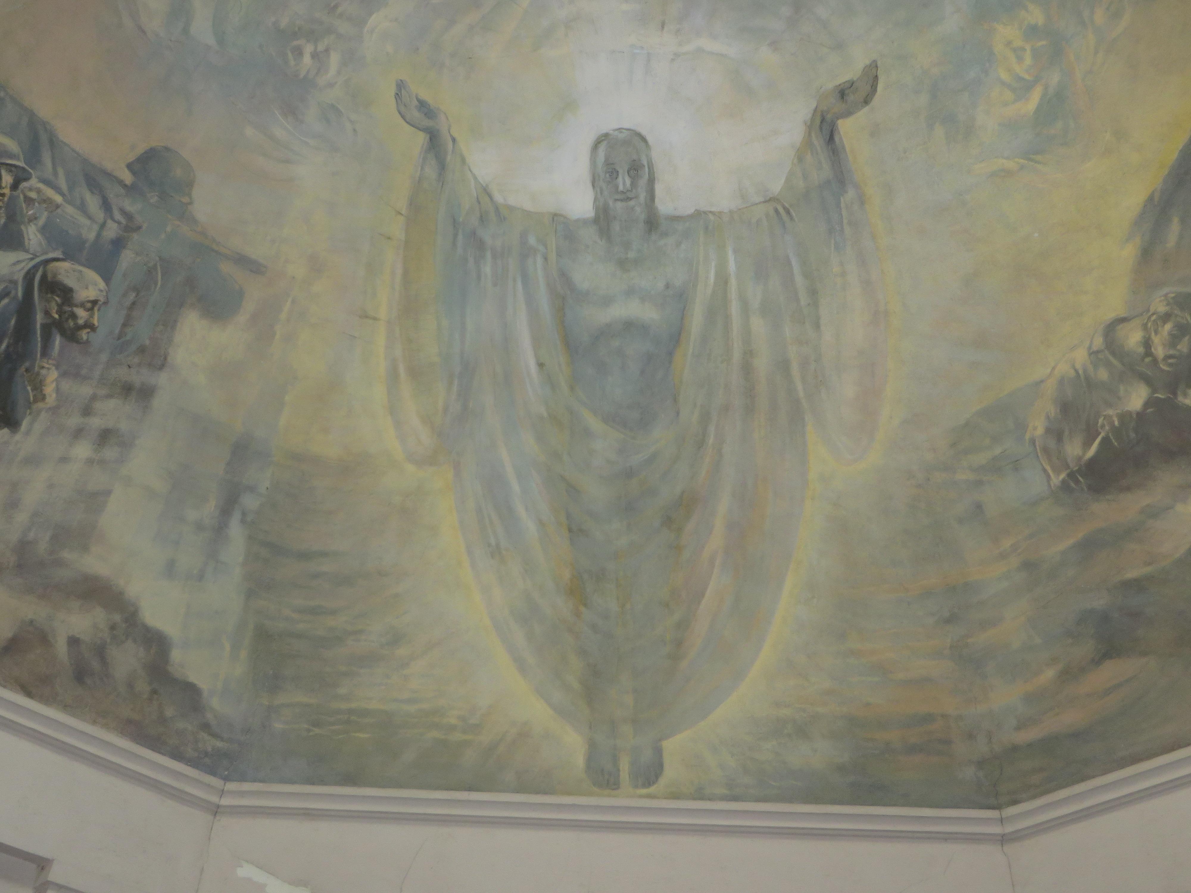 Ausmalung der Kuppel der Gedächtniskapelle auf dem Alten Friedhof durch den Kunstmaler Carolus Vocke 1946